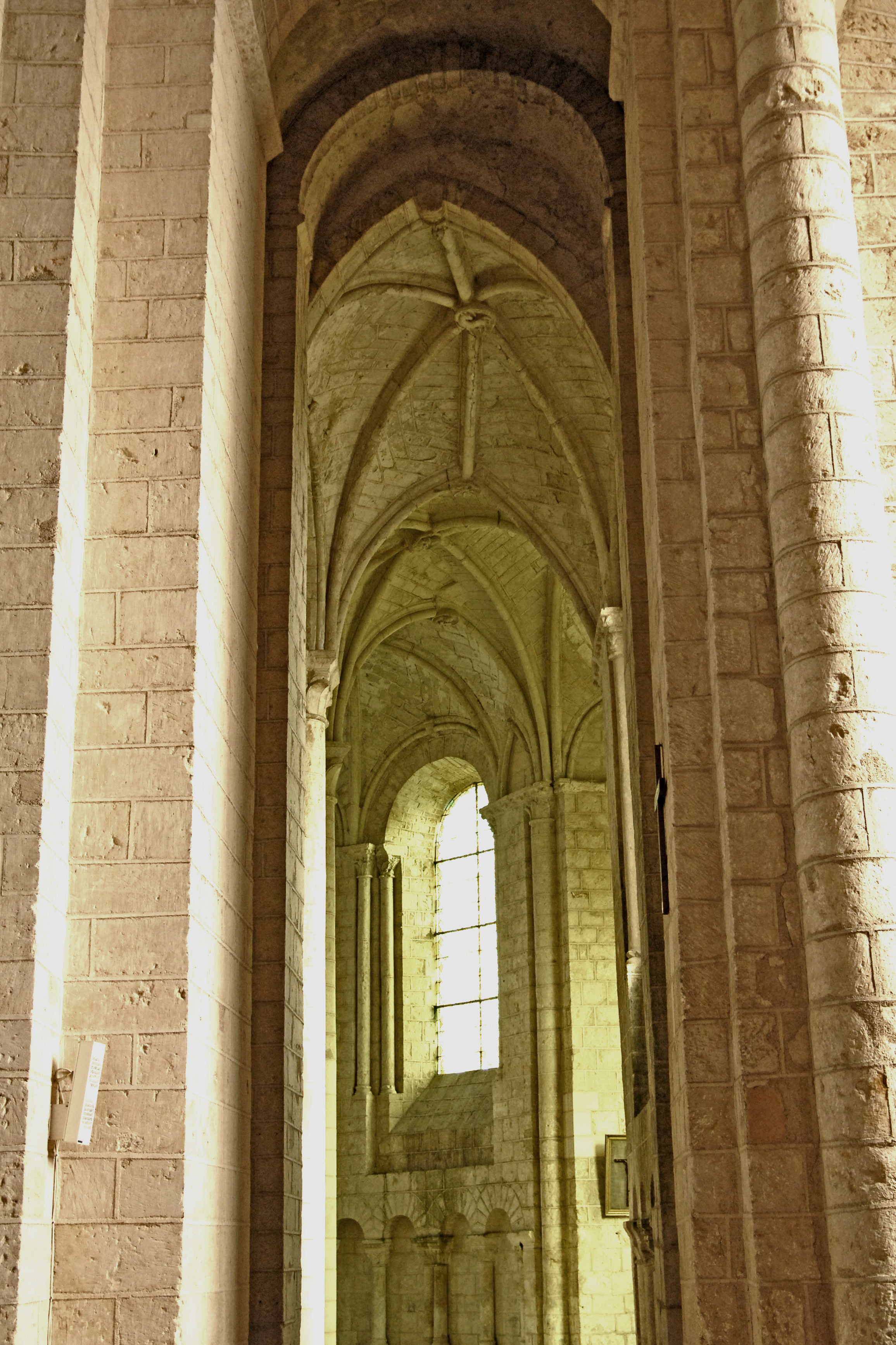 Saint-Jouin-de-Marnes, südlicher Chorumgang